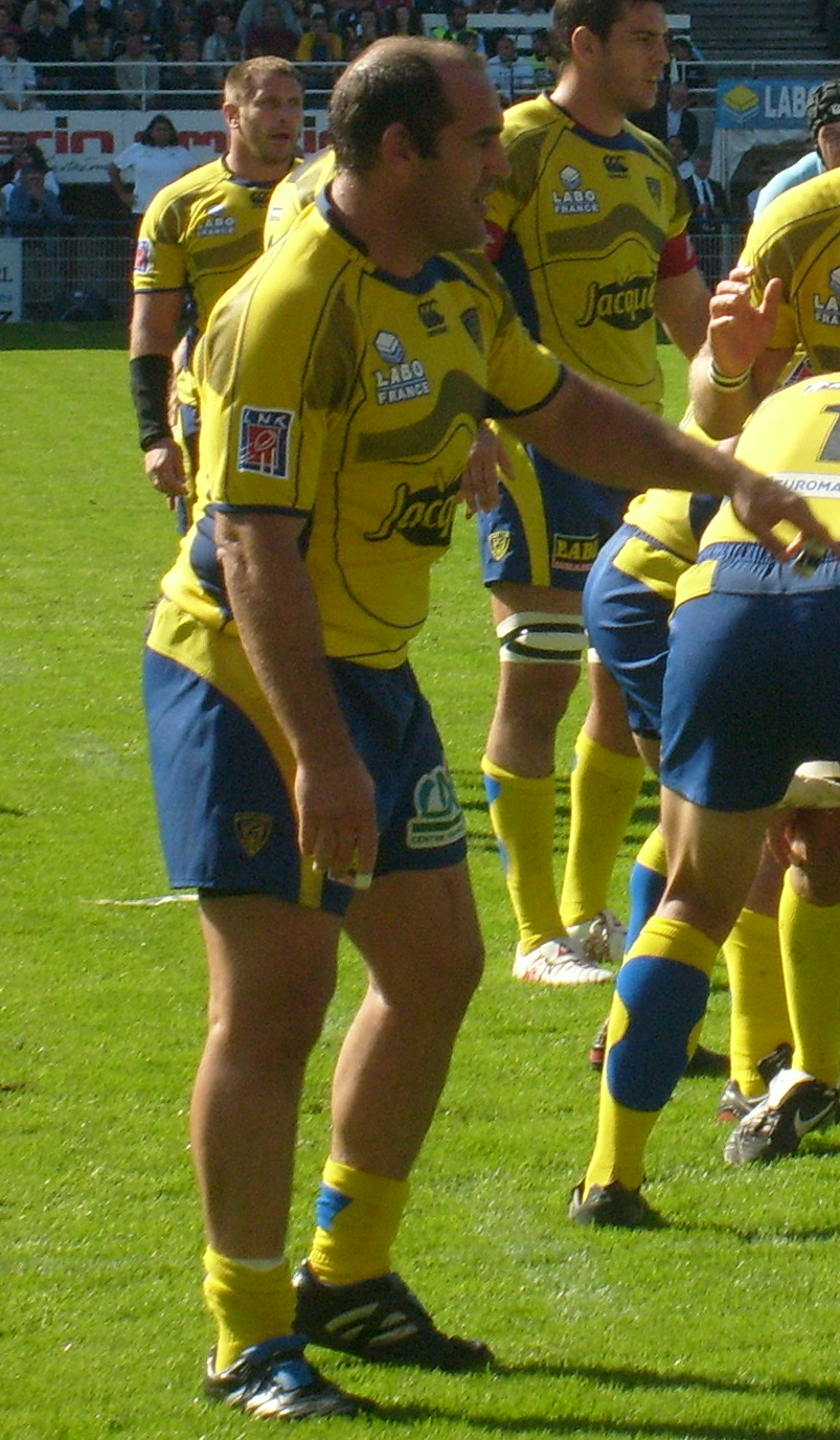 Mario Ledesma affronte l'Aviron Bayonnais dans les rangs de l'ASM Clermont Auvergne au stade Marcel Michelin de Clermont-Ferrand.